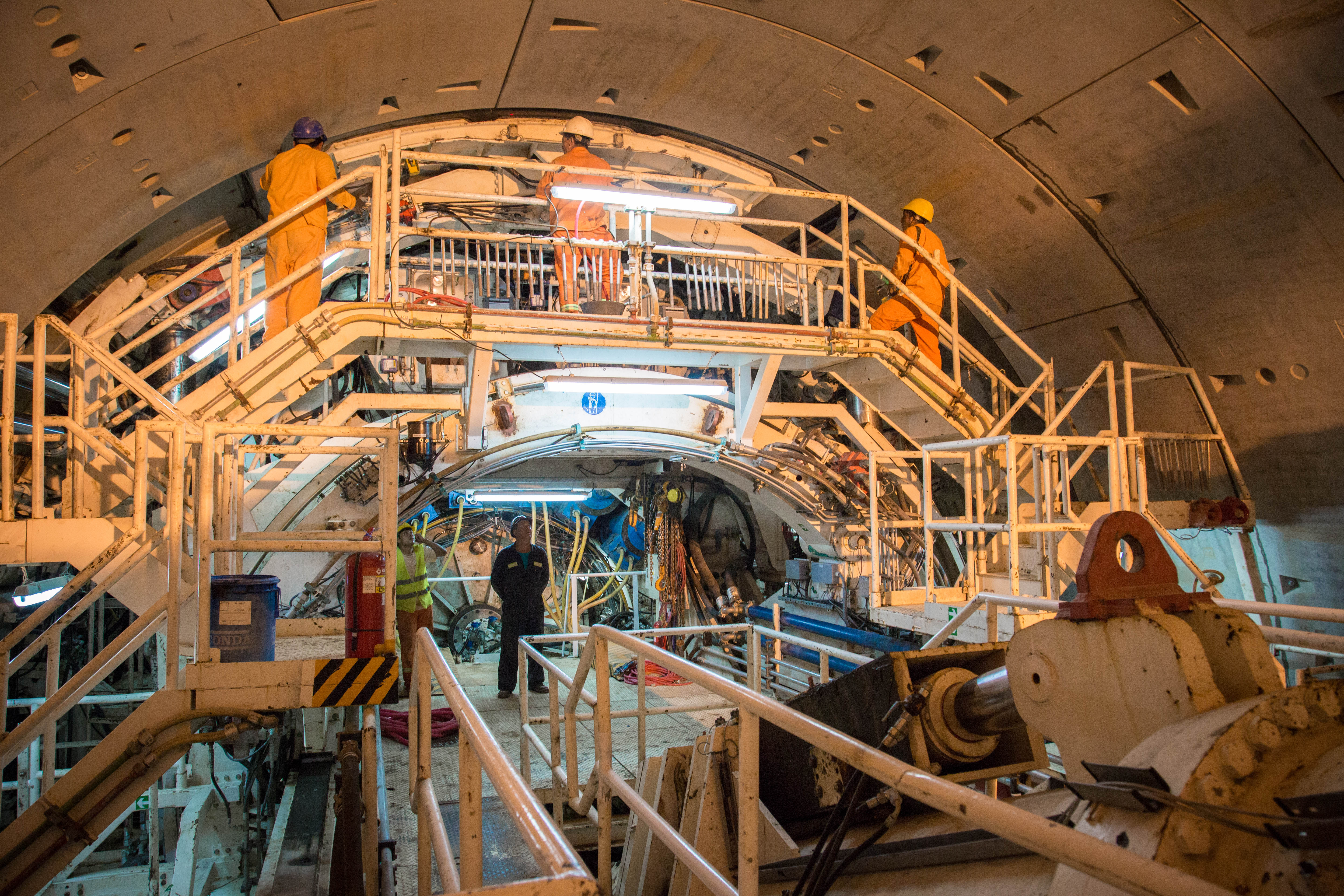 Se puede ver parte del túnel del soterramiento, obreros trabajando equipamento y la tuneladora.